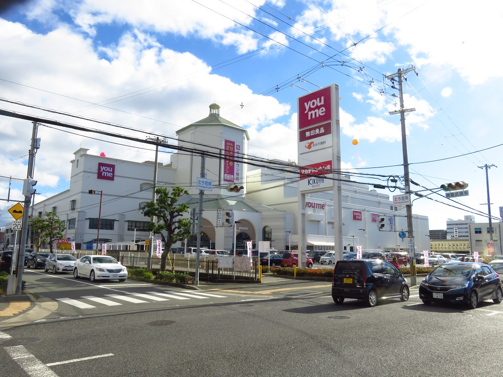 ゆめタウン姫路